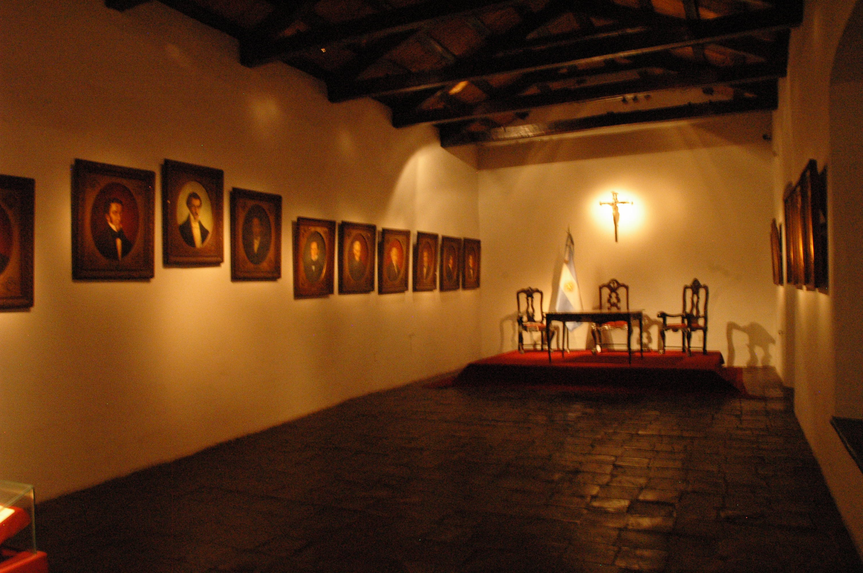 Salón de la casa Historica de Tucumán.